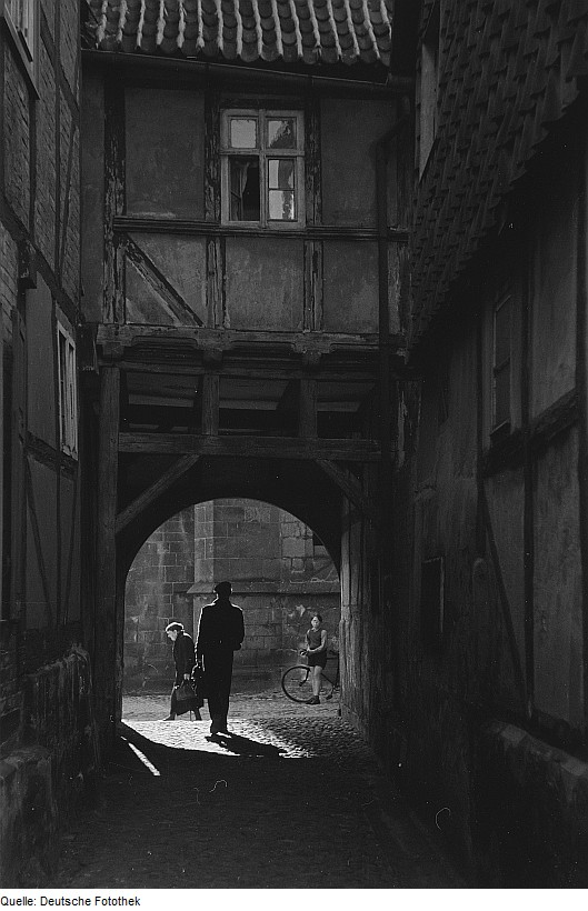 Original image description from the Deutsche Fotothek Roger Rössing in der Altstadt